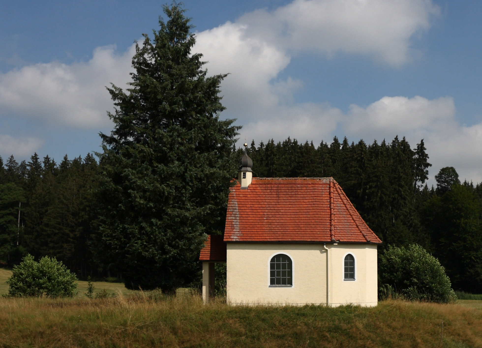 Ansicht von Süden